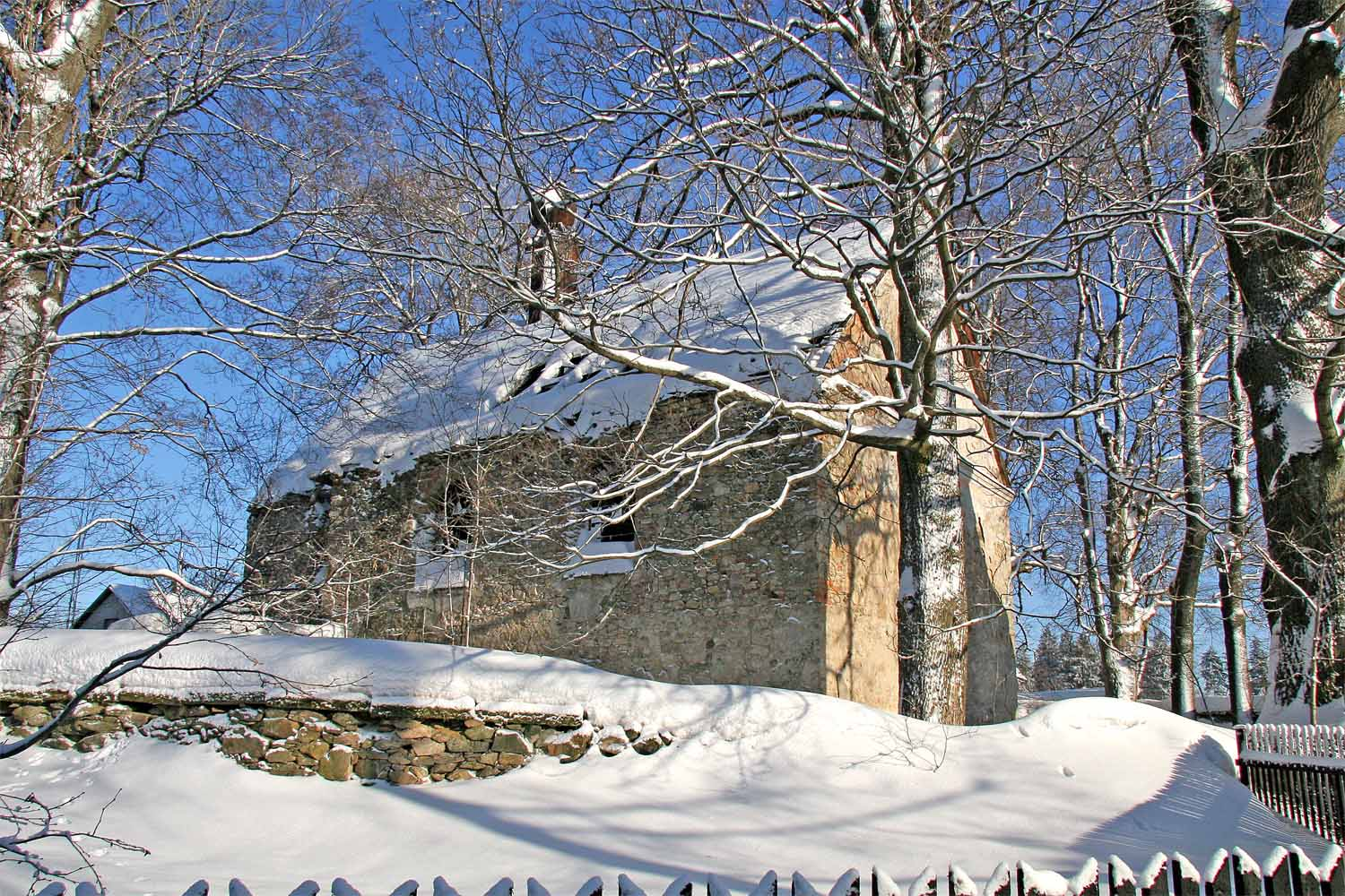 Budoucí zřícenina kostela Svaté Kunhuty v osadě Polom